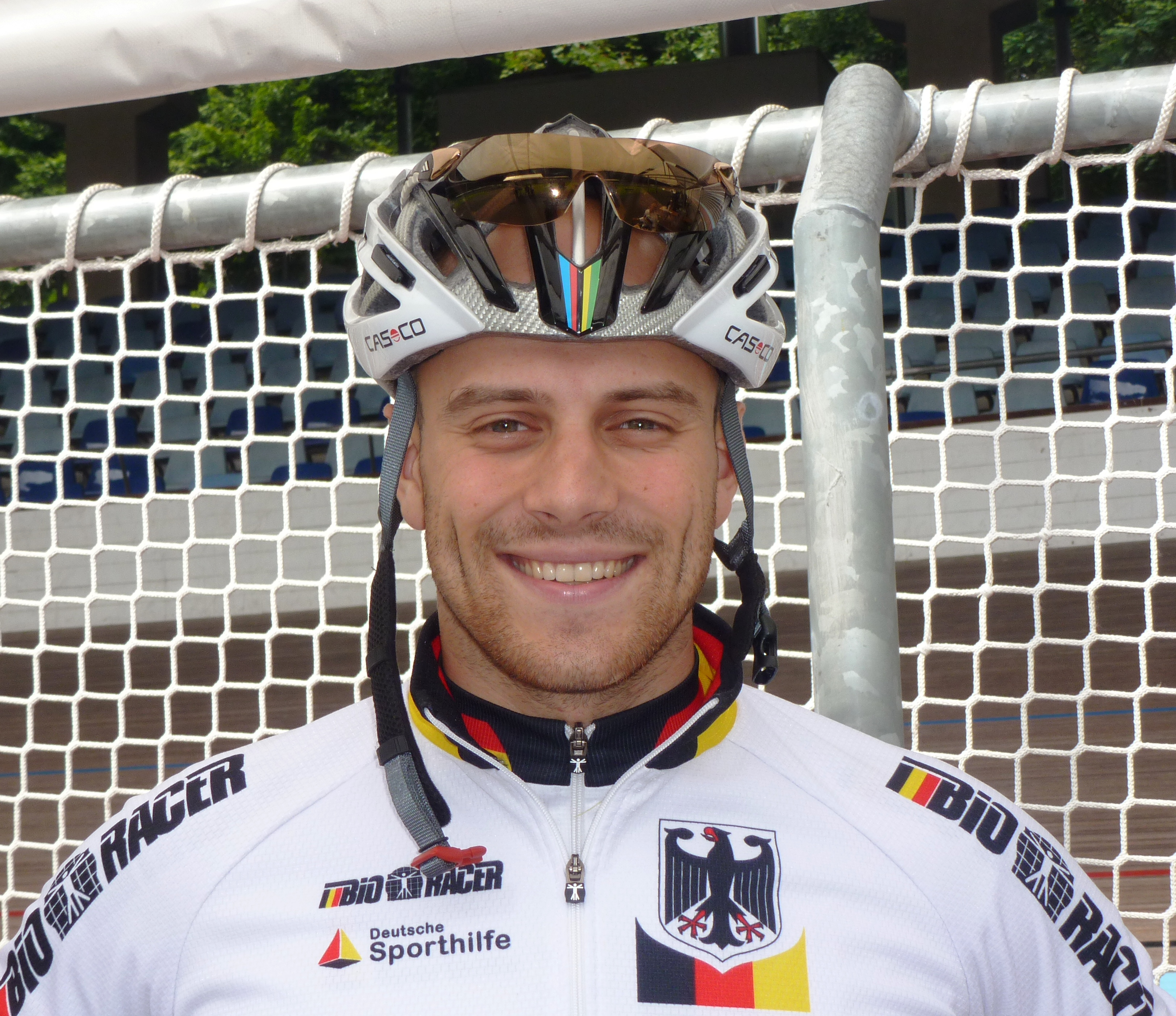 Maximilian Levy, deutscher Bahnradsportler